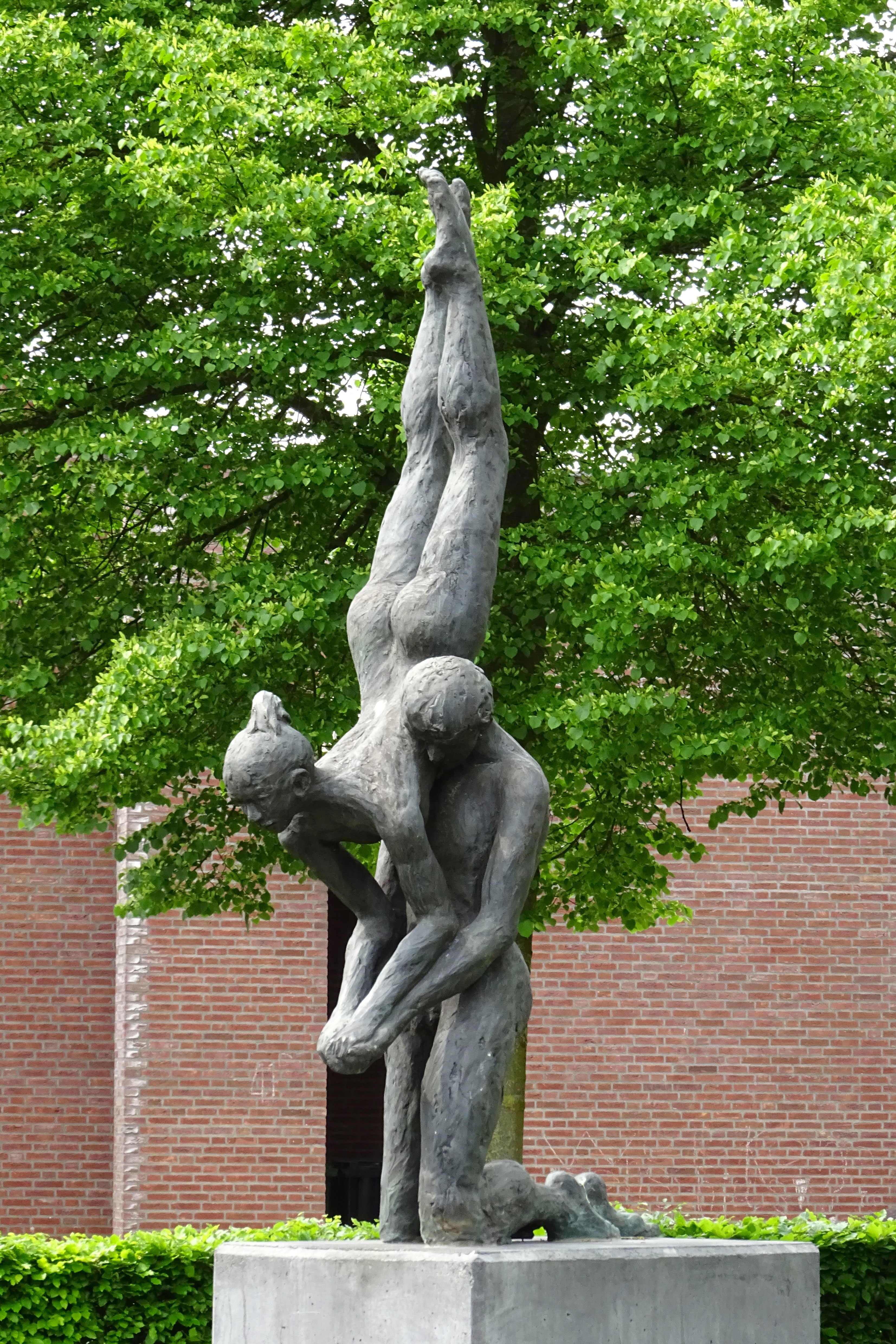 Balans door Frank Rosen - Boschweg/Floralaan in Schijndel